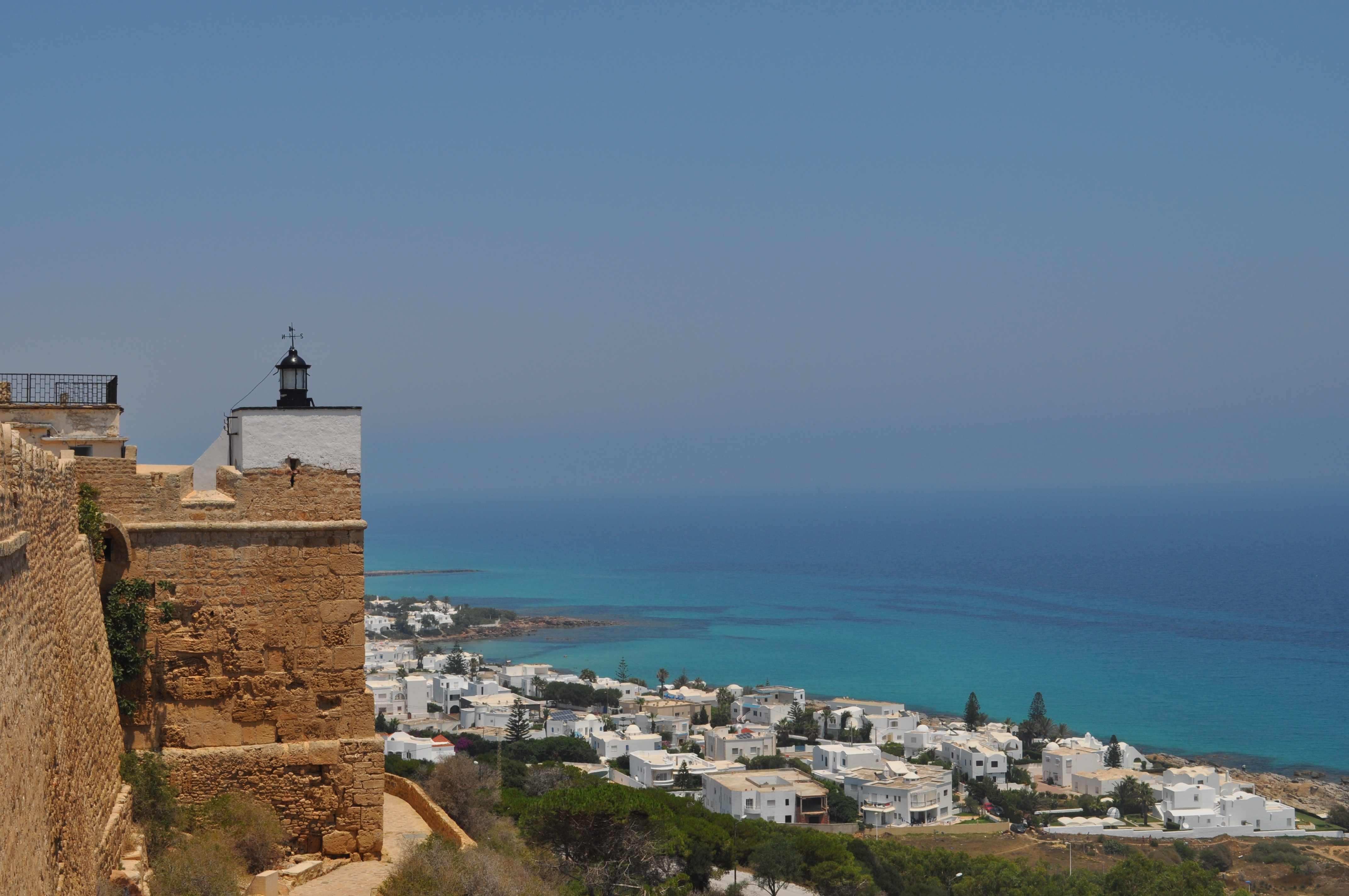 Ancien fort appelé « Kasba »